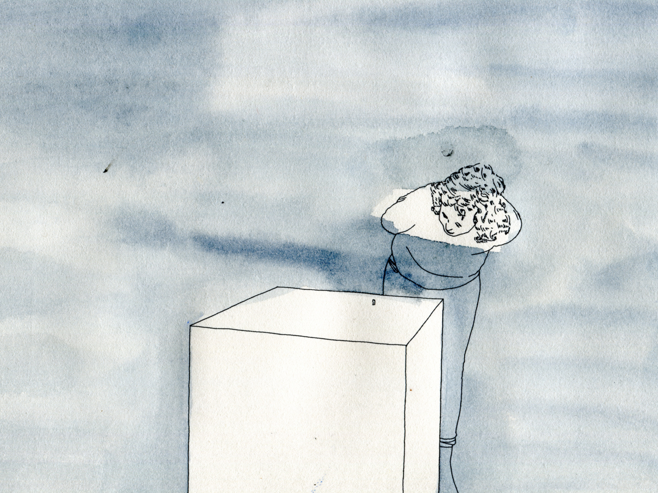 Werk "Prof. Dr. Sabine Gebhardt Fink" in einer Ausstellung von Master Kunst in Luzern.